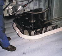 Ölsperre Typ Stoplik im Einsatz